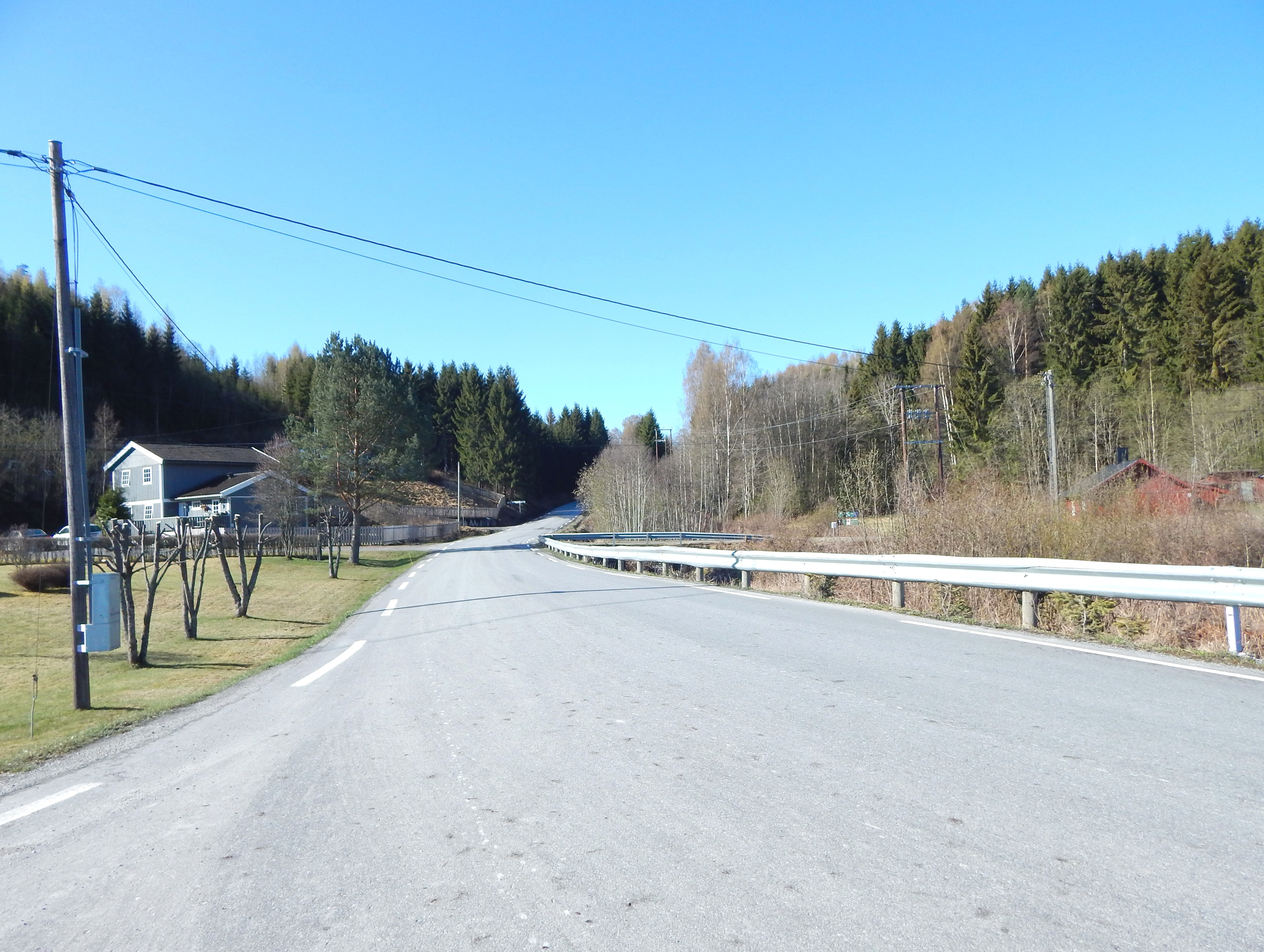 Stensengdalen (fylkesvei 1790, tidl. 97) tar av fra primær fylkesvei 212 ved Kvarbergvika.